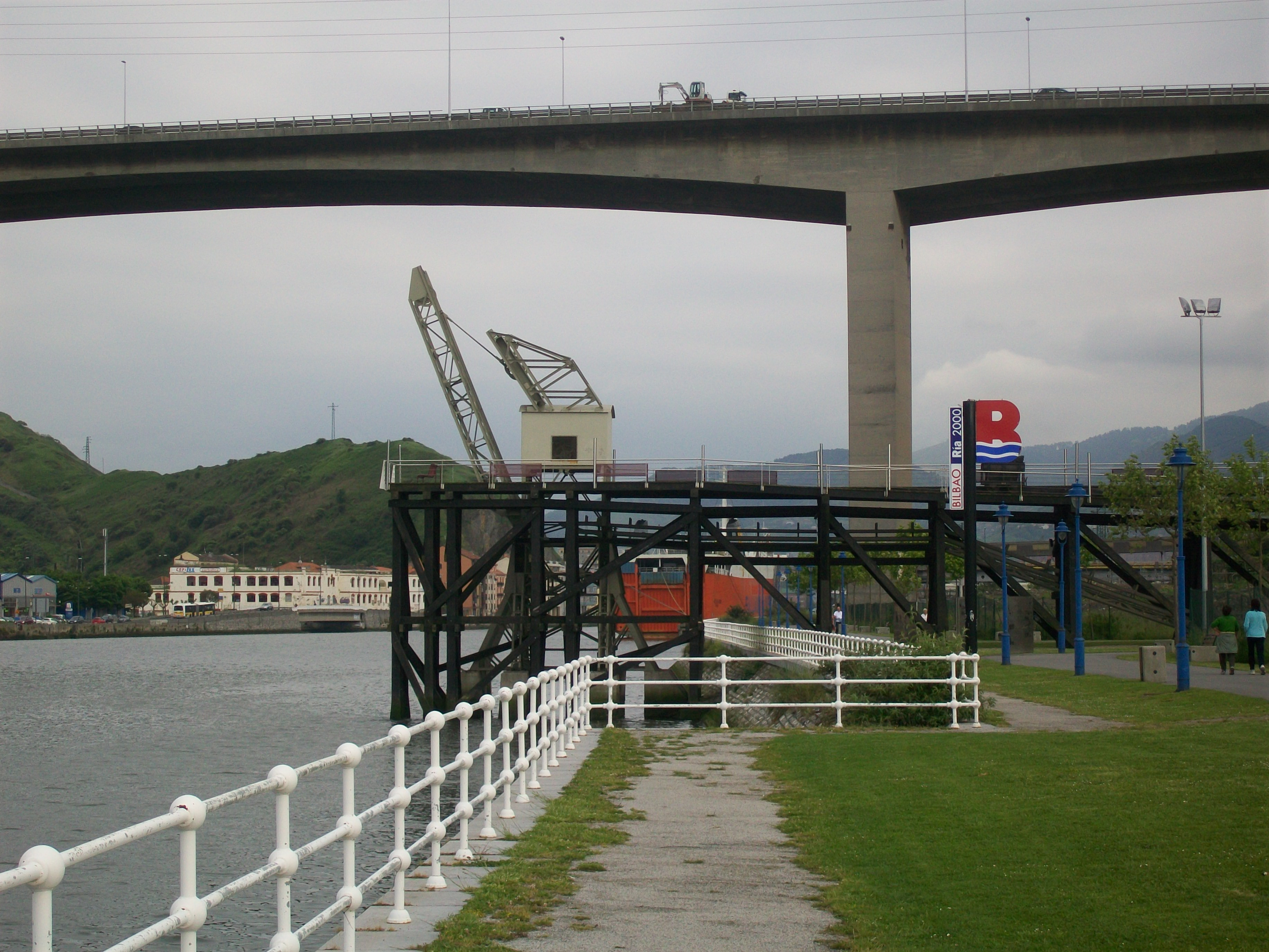 Cargadero de mineral reformado y Puente Róntegui (Baracaldo)